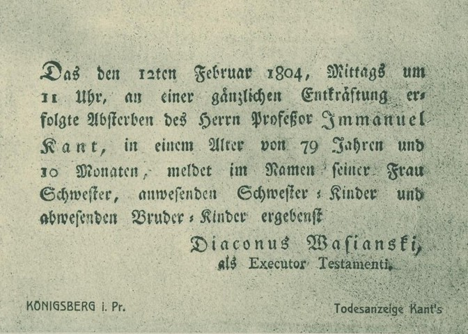 Die Todesanzeige von Kant